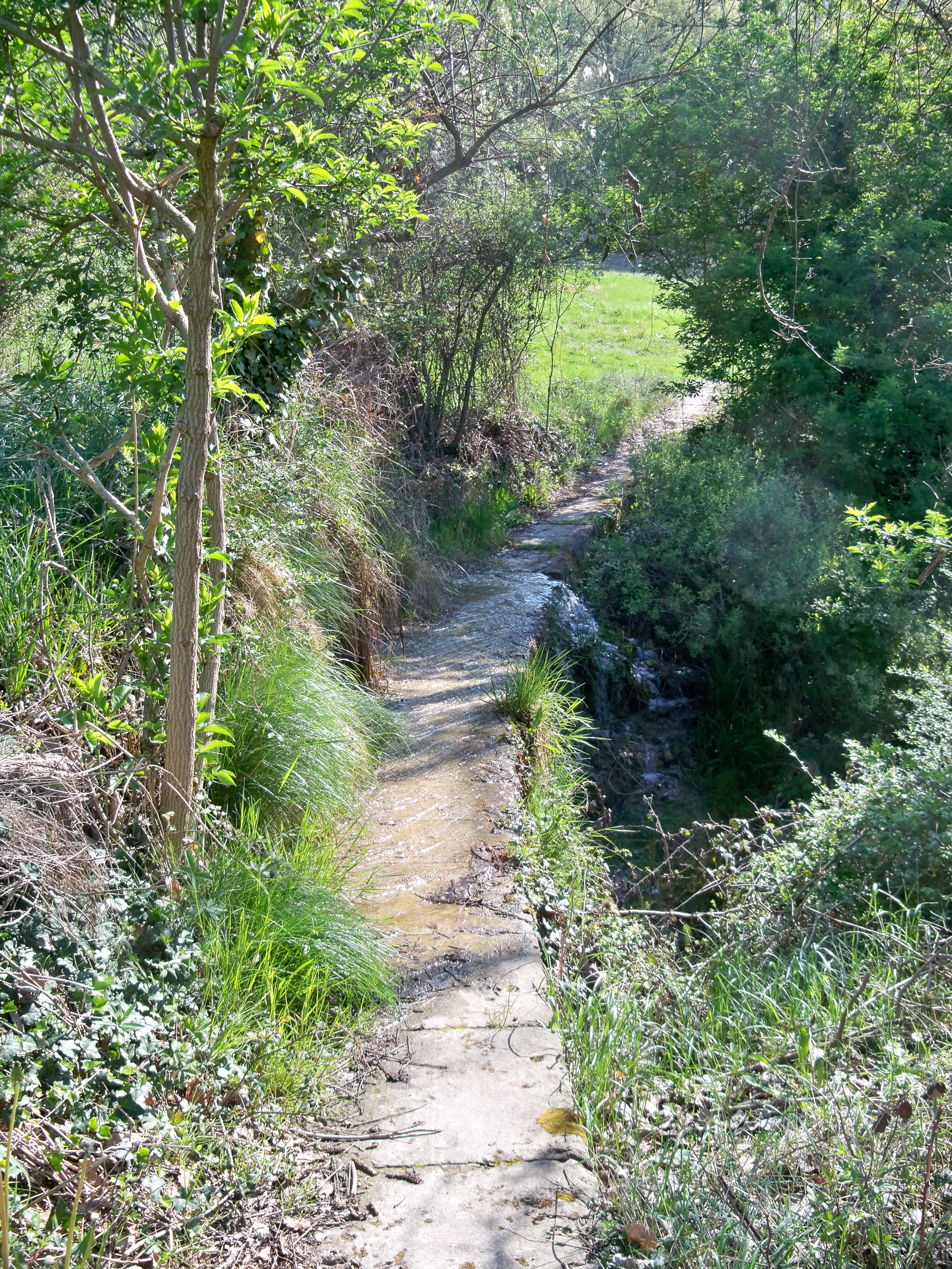 Gué de reculon sur la via Domitia, à Saint Michel l'Observatoire (04)